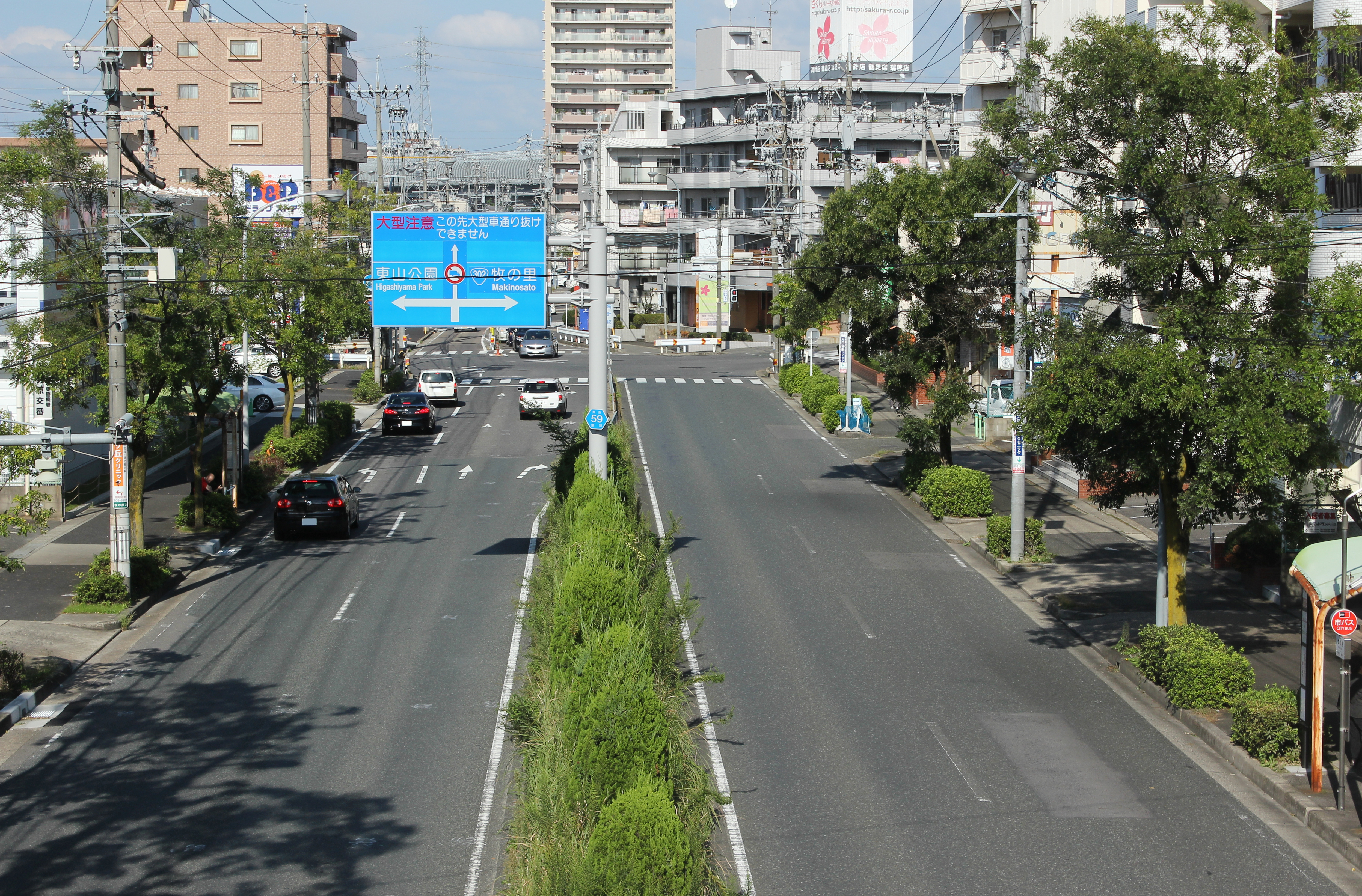 愛知県道59号名古屋中環状線（名古屋市名東区牧の原）